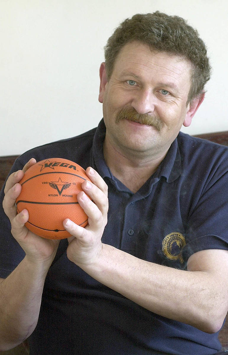 Trener Spójni Czesław Daś (2005)